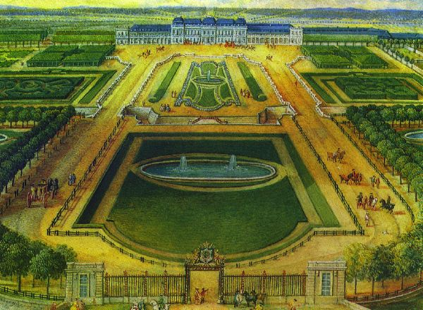 Vue du château de Chanteloup (Touraine, près d'Amboise - détruit), depuis le Nord.